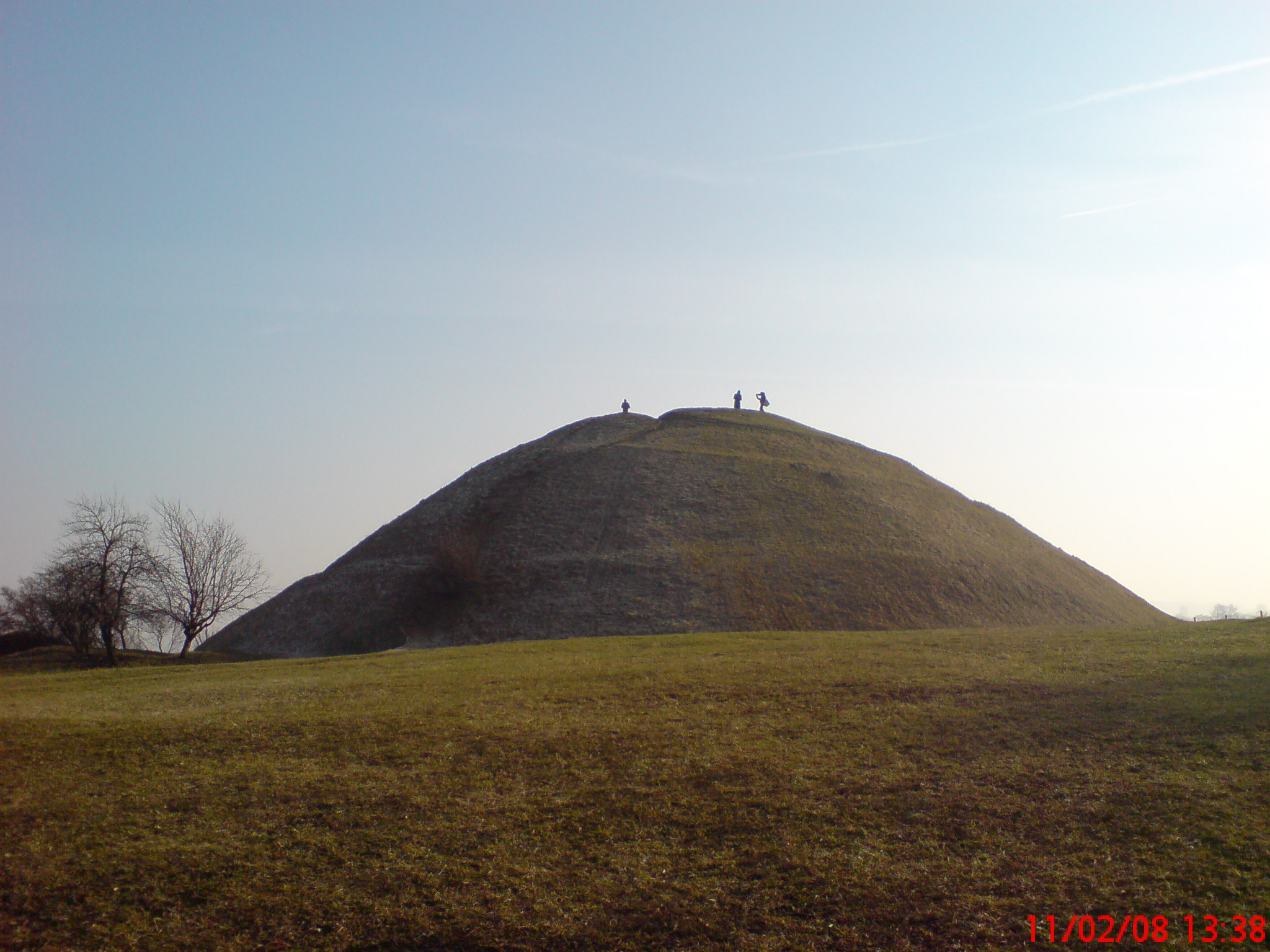 Kopiec Krakusa w Krakowie